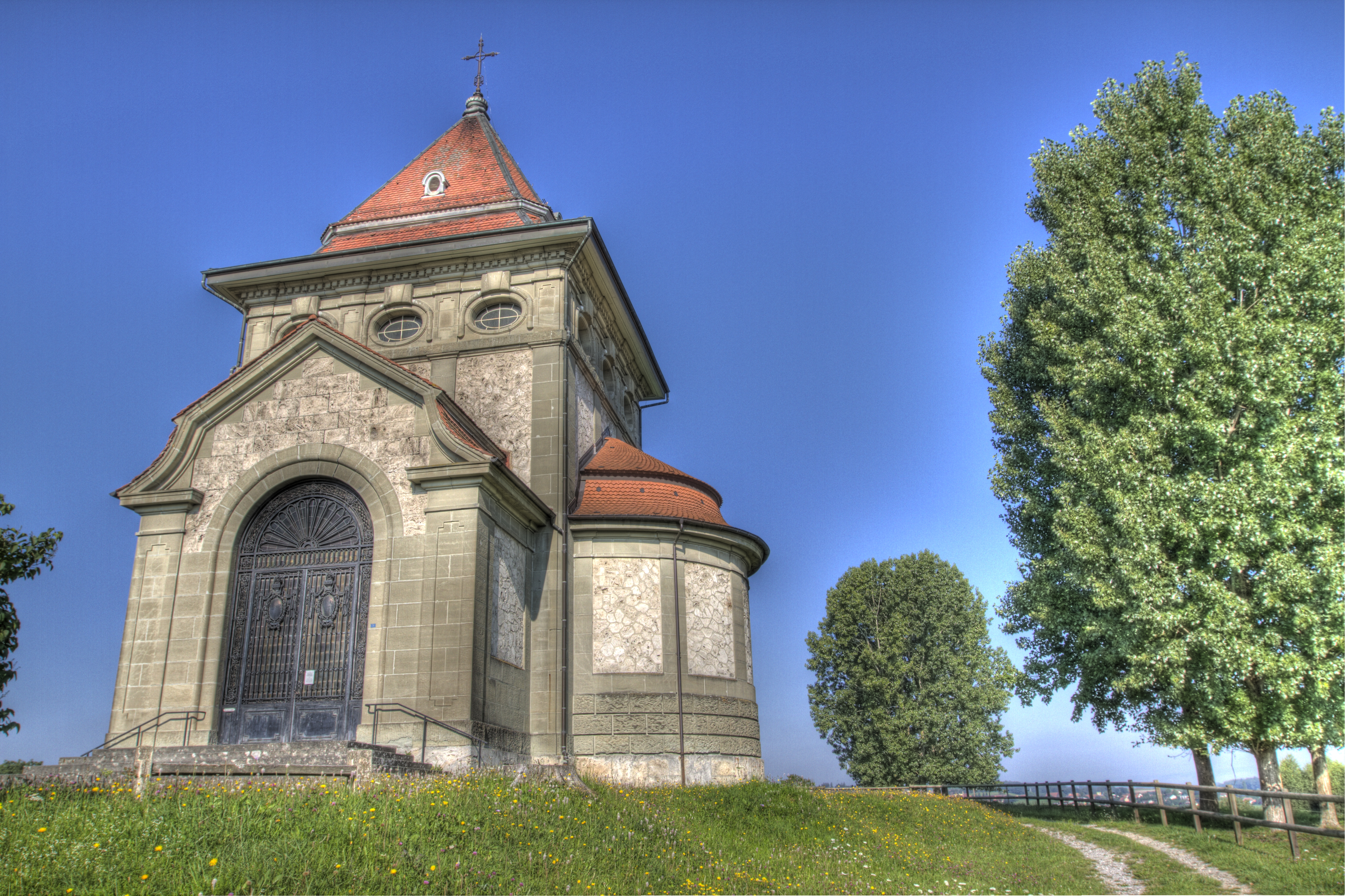 Chapelle du Sacré-Coeur à Hauterive (FR) 1